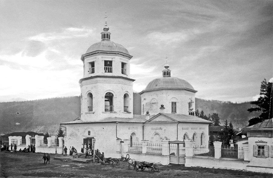 Спасский собор в Киренске. Фото из альбома священника Пономарева, 1913 год